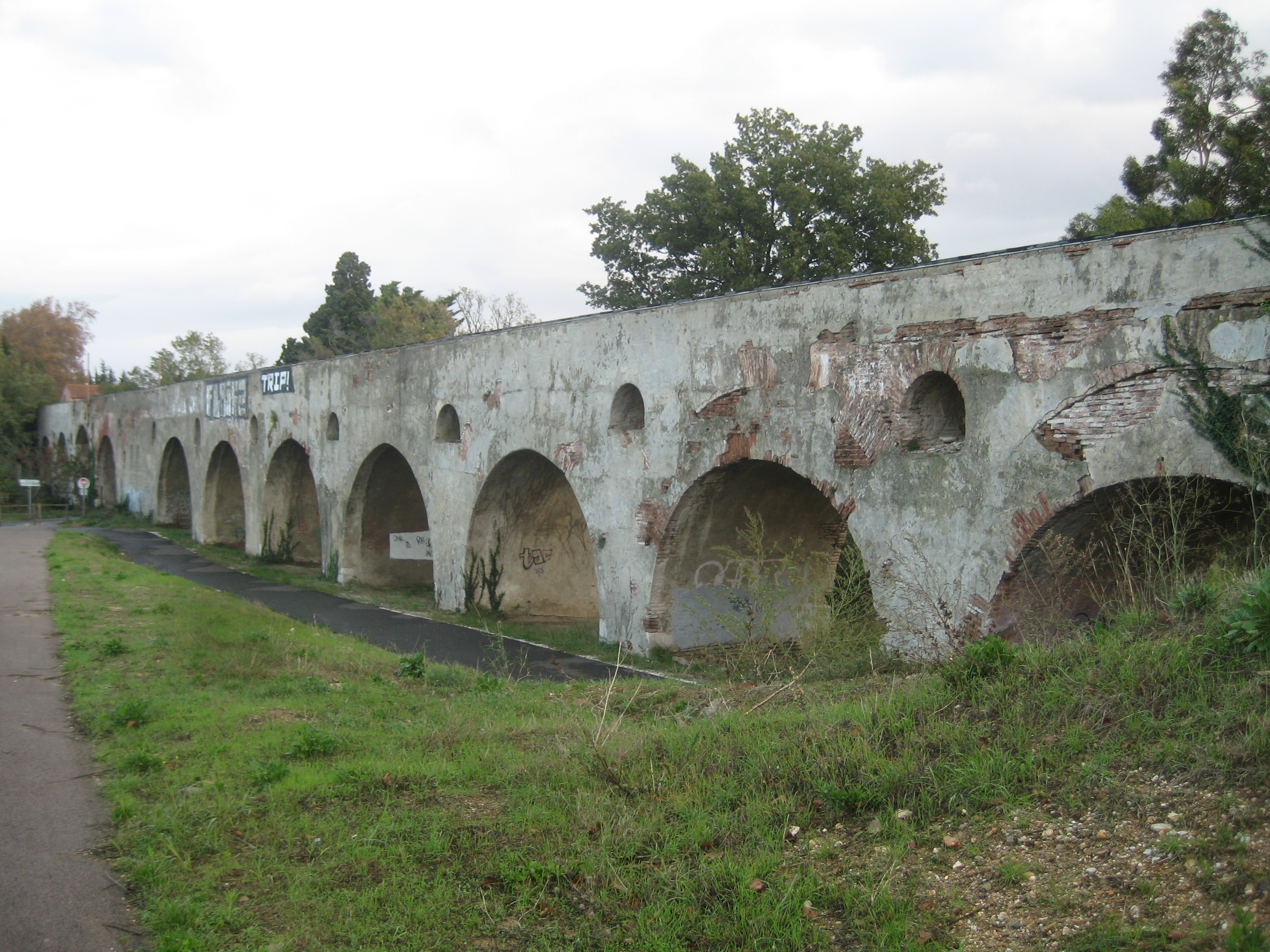 Aqueduc des arcades, Perpignan .